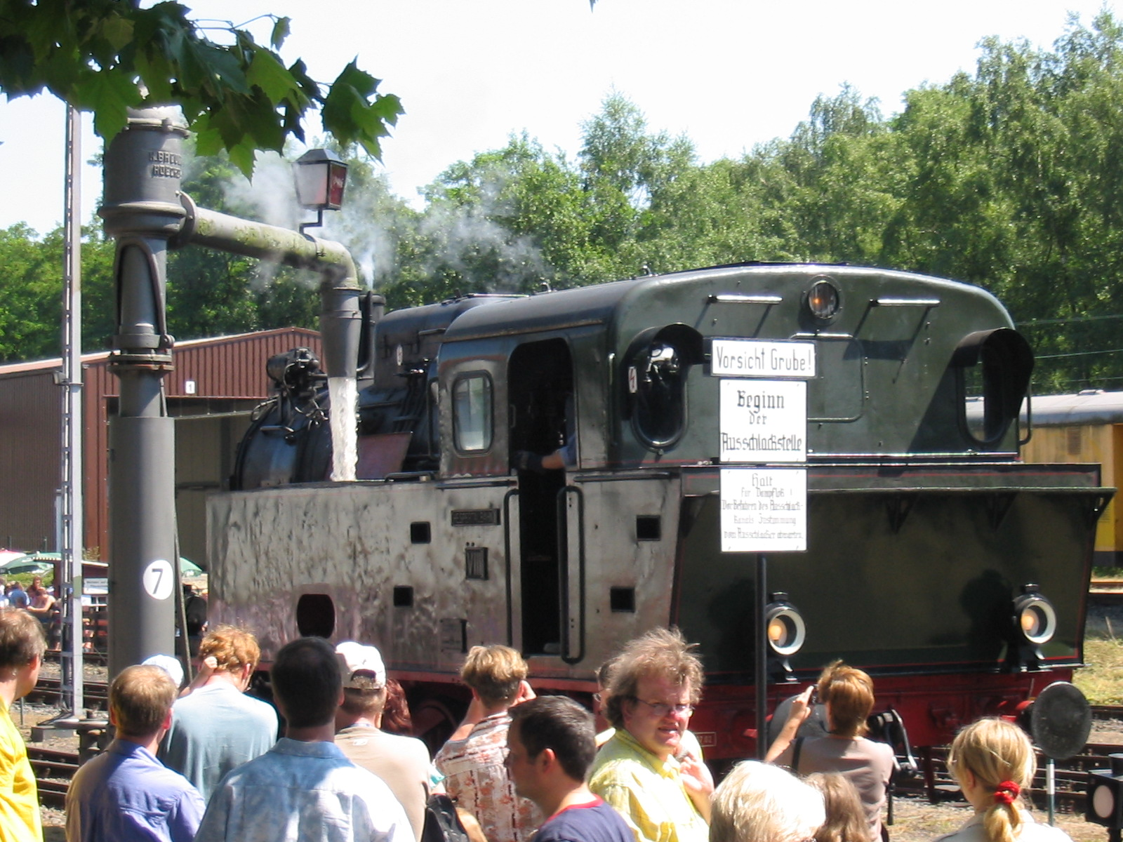 Dampflok im Eisenbahnmuseum Bochum.